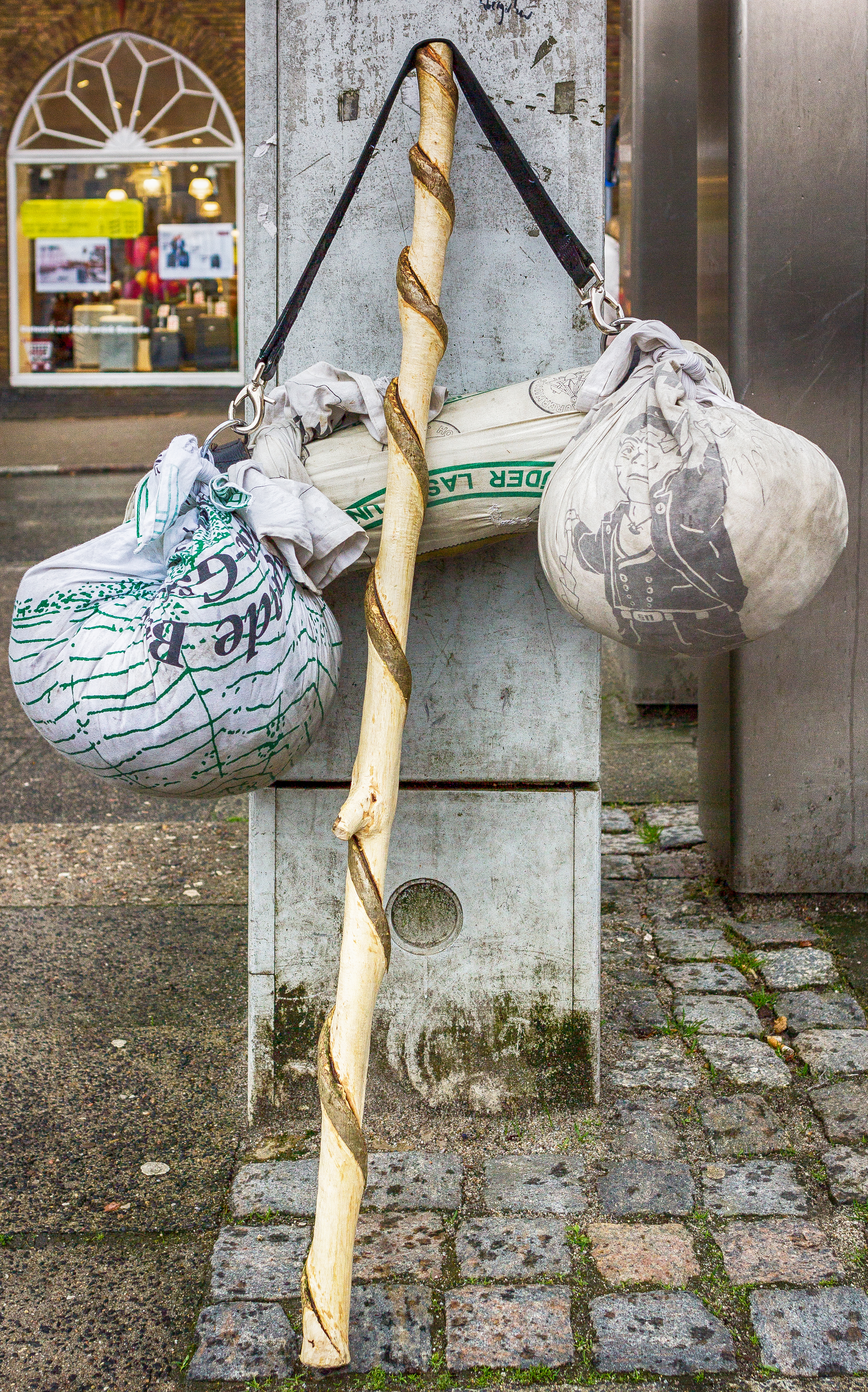 Das Gepäck eines Handwerkers bei den Wanderjahren. Am Südermarkt zur Angelburger Straße hin.